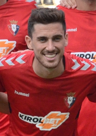 CSC_0149